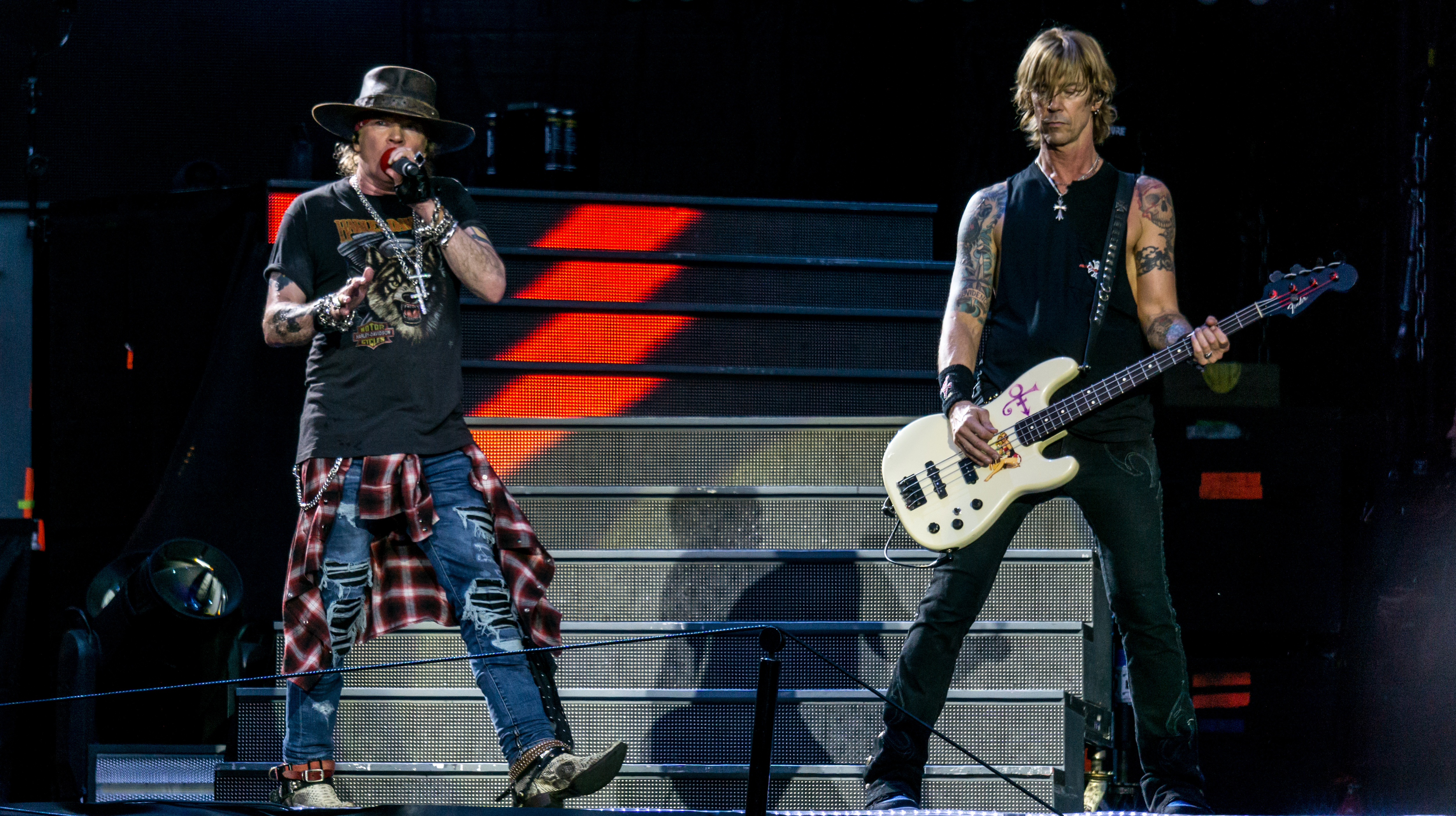 GunsNRoses160617-30